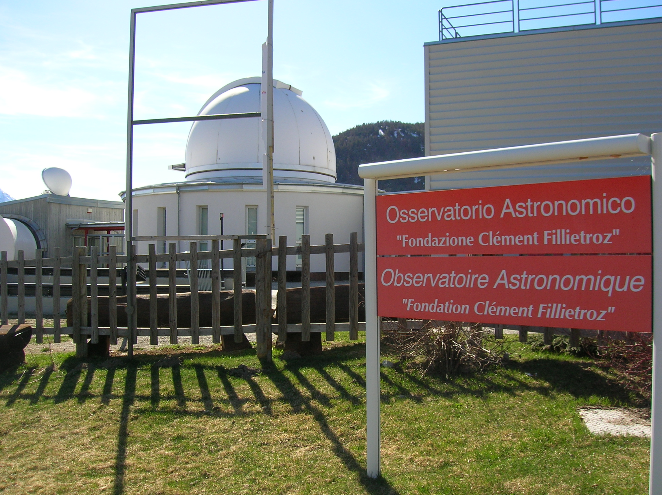 Osservatorio astronomico Fondation Clément Fillietroz: osservatorio astronomico e planetario di Saint-Barthélemy, presso la località Lignan, comune di Nus, Valle d'Aosta, Italia. E' l'Osservatorio astronomico della Regione Autonoma Valle d'Aosta.